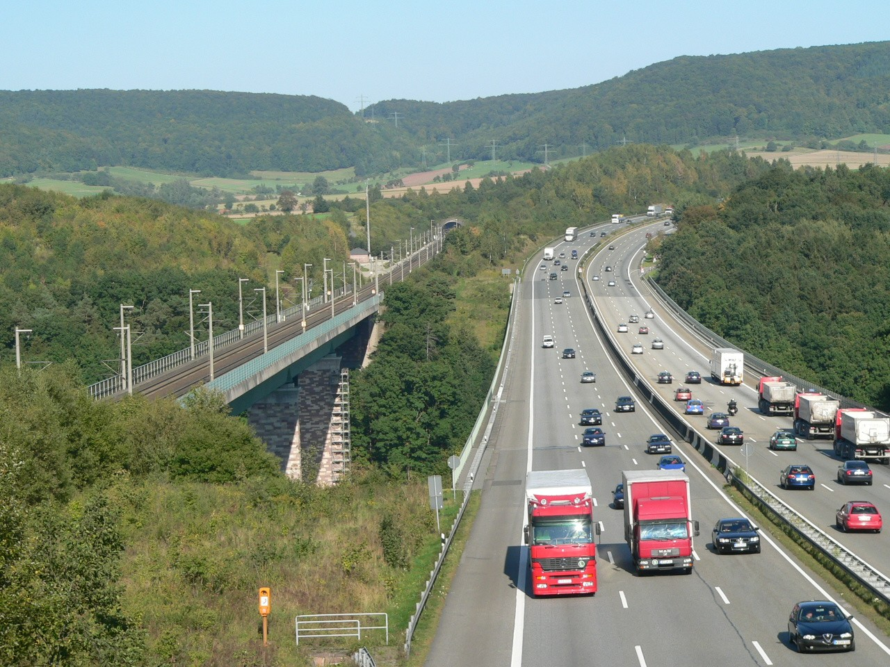 Werratalbruecken der ICE-Strecke Wuerzburg - Hannover (links) und der A 7 (rechts).